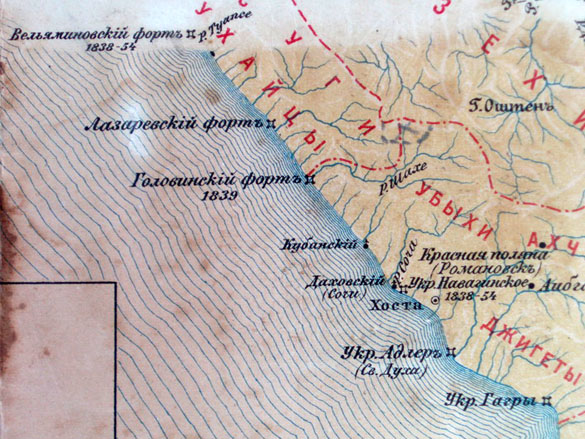 Черноморское побережье (Российская империя)